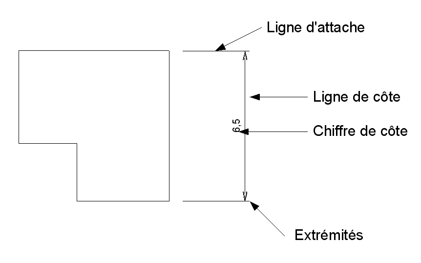 Cotation, les différents éléments constituant une cotation.